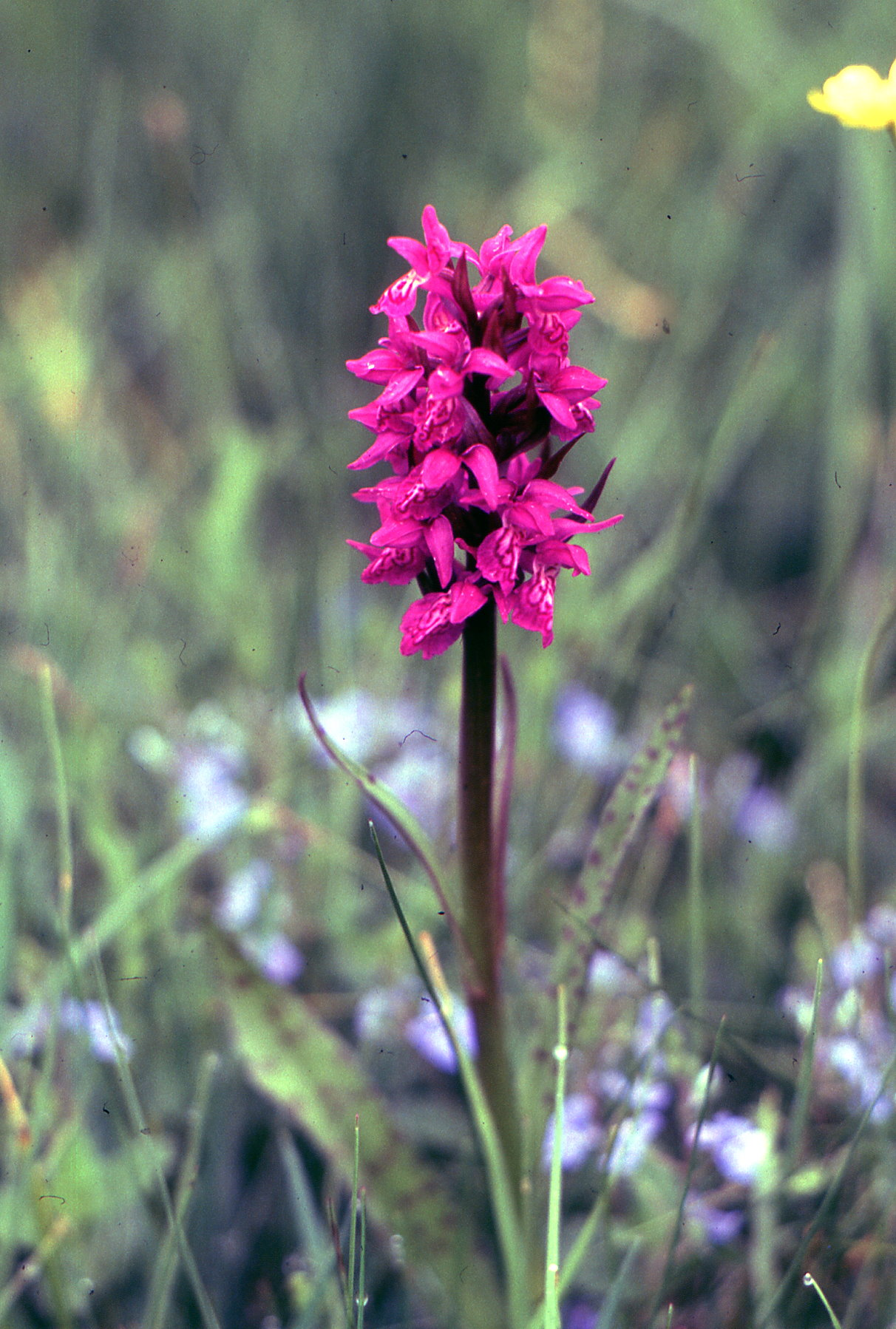 Orchidaceae, Blutrotes Knabenkraut, Italien, Welschnofen, Rosengarten Photo: U.Schmidt, 1991